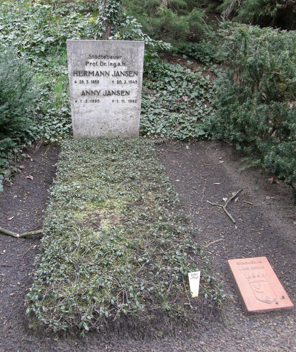 Ehrengrab von Hermann Jansen auf dem Friedhof Heerstraße. Trakehner Allee 1, Berlin-Westend.